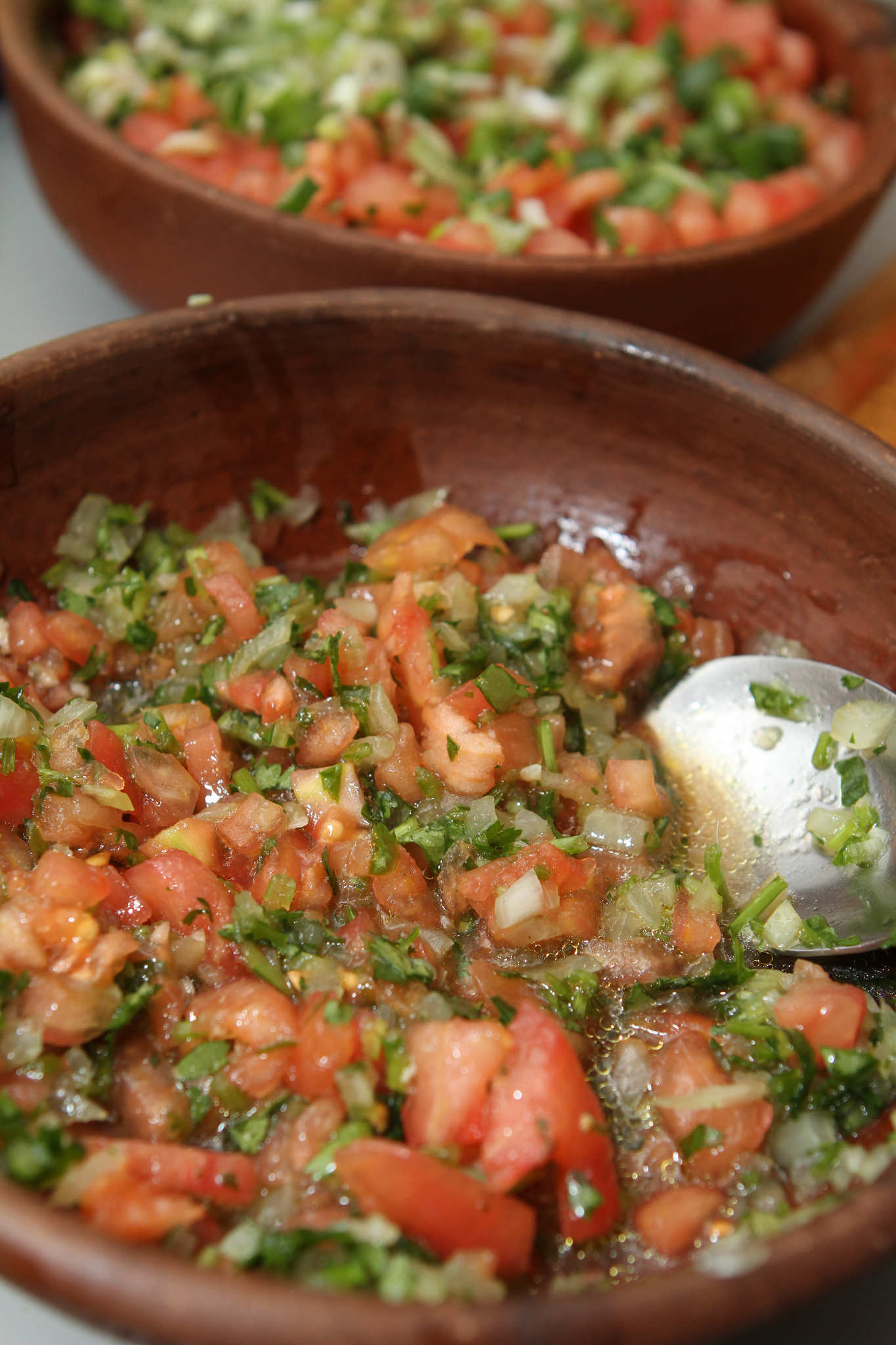 Pebre